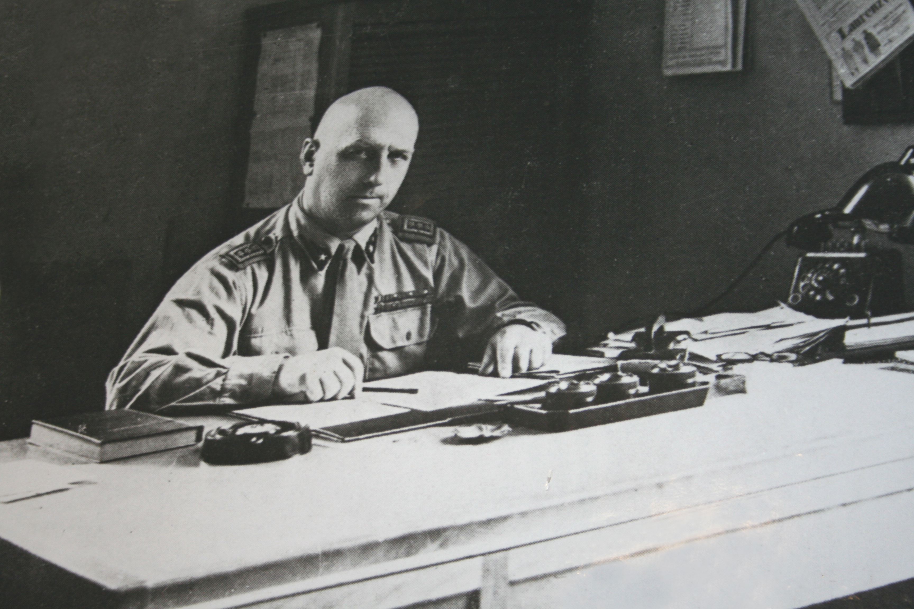 Gennaro Sora, Foresto Sparso, ripresa e caricata da Giorces. Trasmessa a l'autorizzazione del Sig. Sindaco che si ringrazia per la collaborazione.